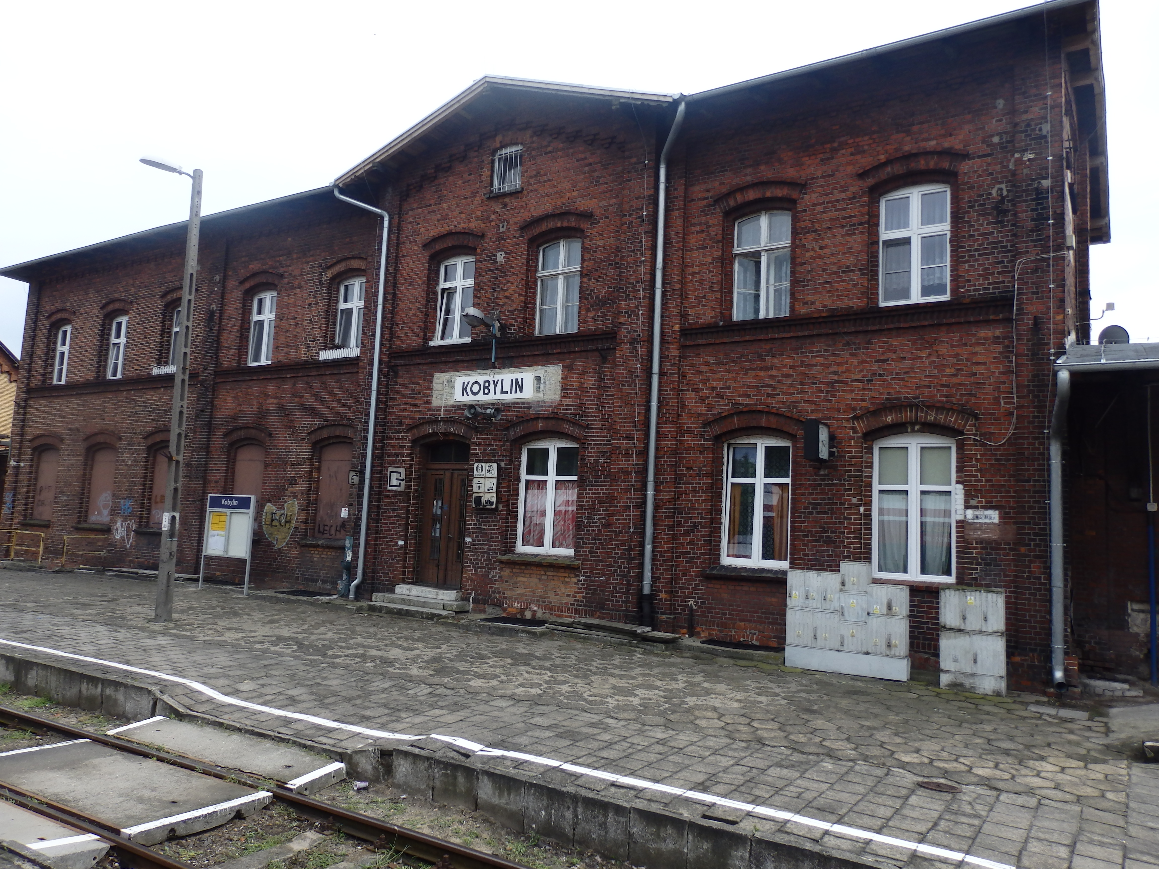 Stacja kolejowa w Kobylinie.